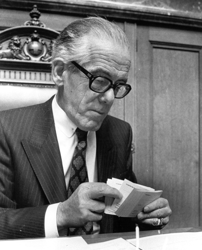 André Gautier, Genfer National- und Ständerat